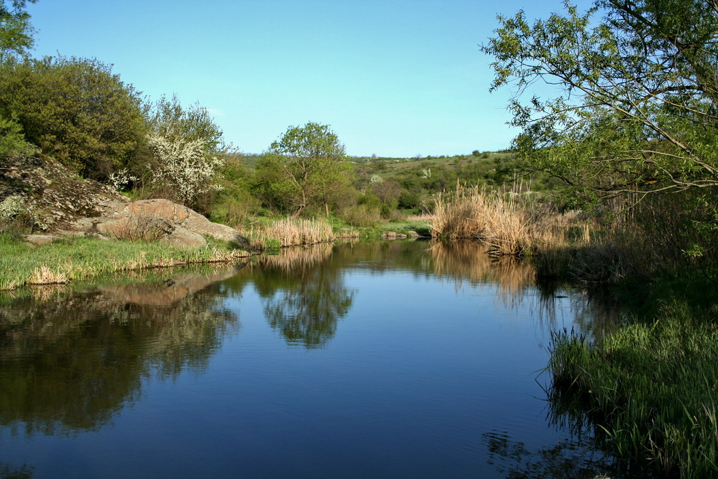 Mertvovod river